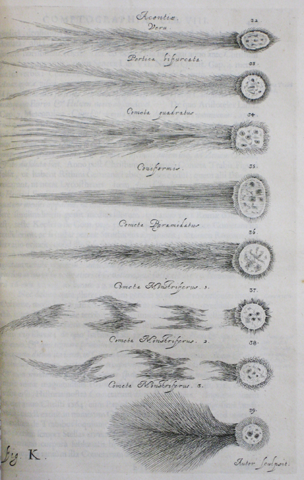 Tavola K dell'opera Cometographia di Johannes Hevelius